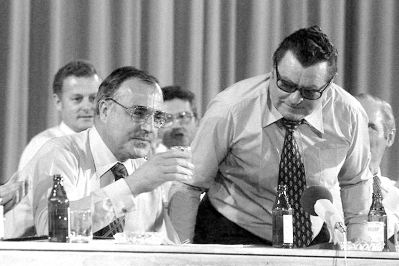 CSU-Wahlparteitag 1976 in München 25.-26.6.1976